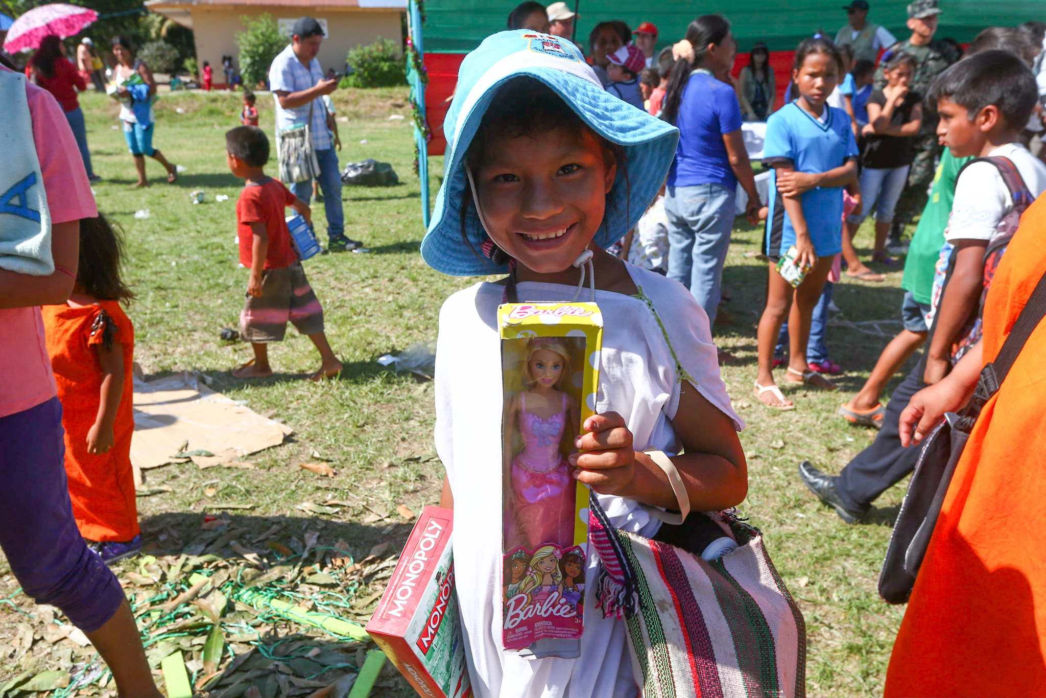 Niña con regalo durante chocolatada navideña en Puerto Ocopa, Perú